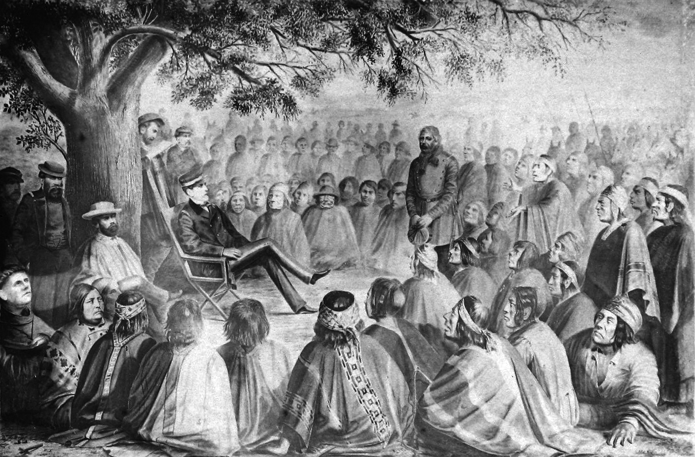 Cornelio Saavedra, oficial chileno, en reunión con caciques mapuches durante la primera fase de la Ocupación de la Araucanía .